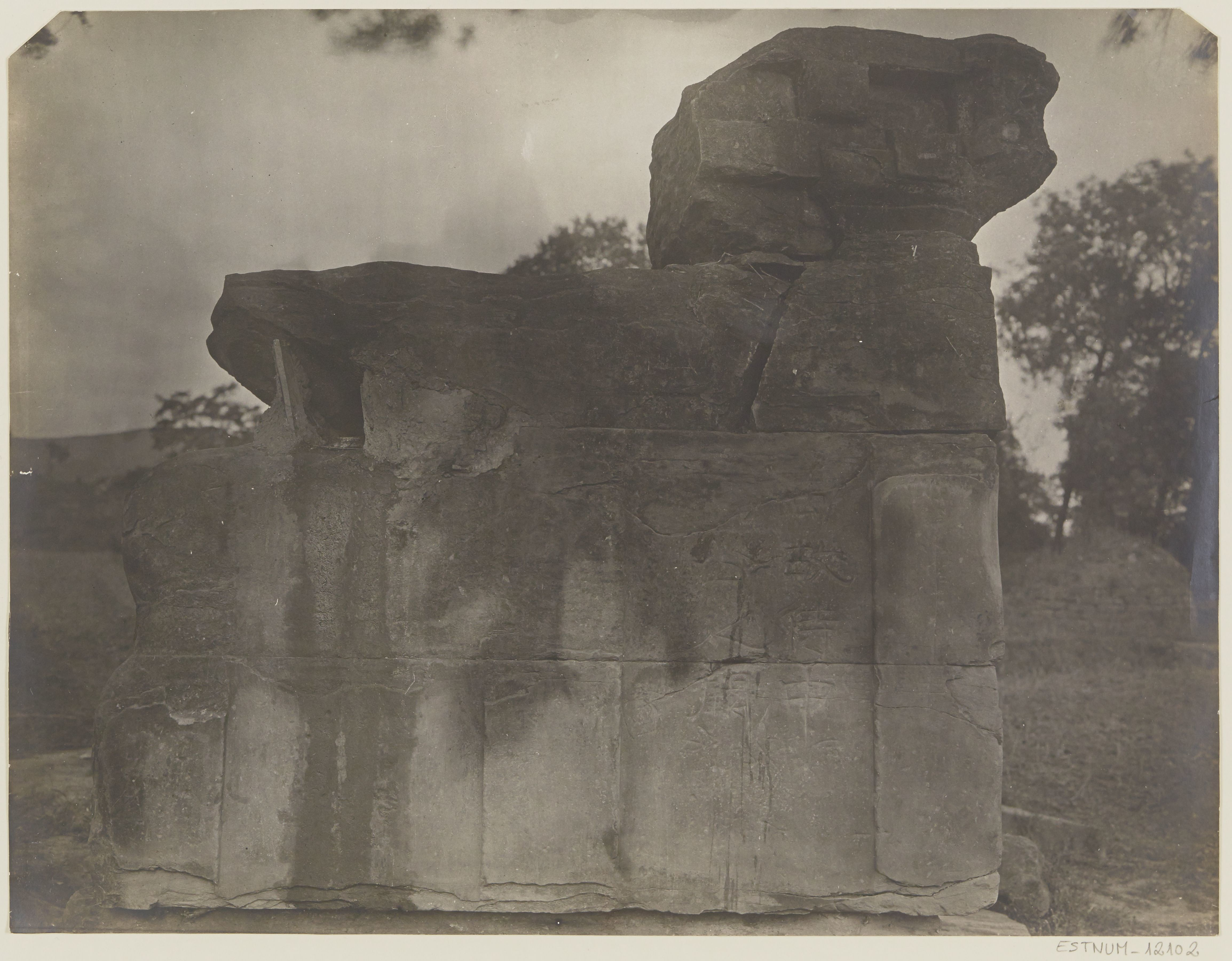 中文（台灣）: 梓潼漢代四闕